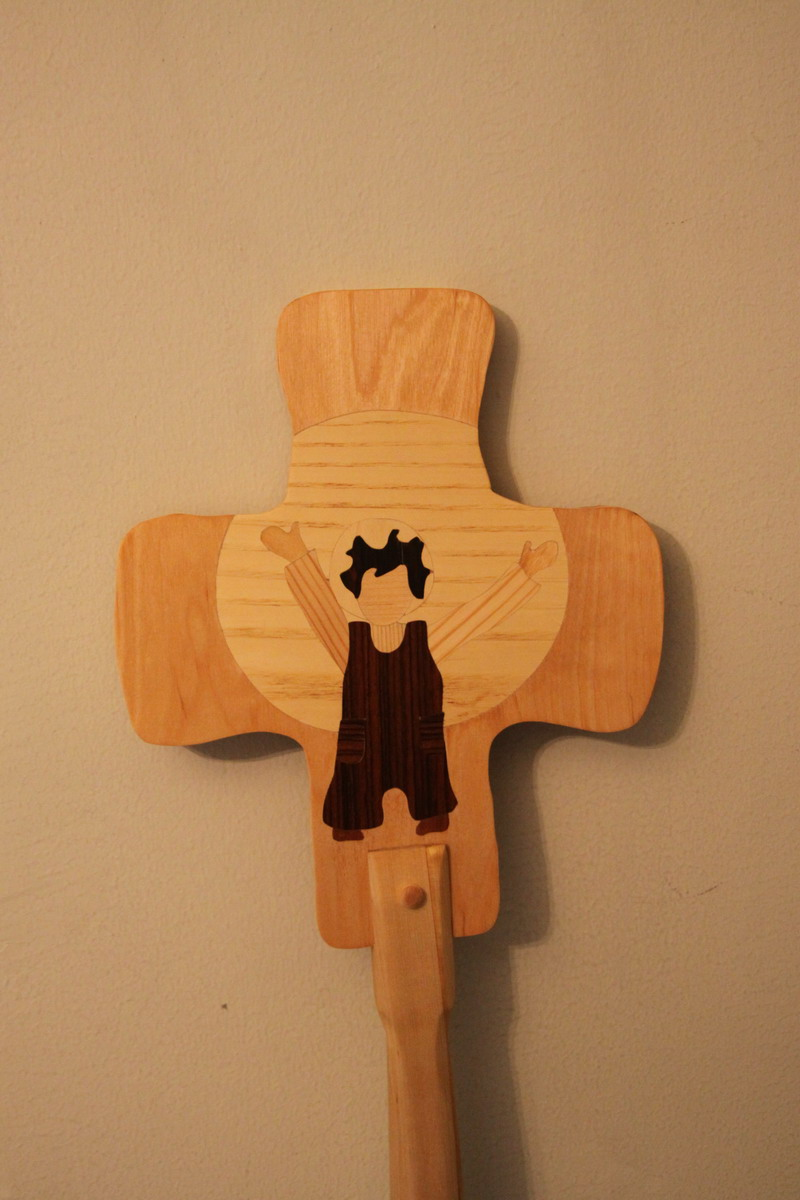 Processionskors speciellt för barn, utfört av Ingårdas Åsa i intarsia